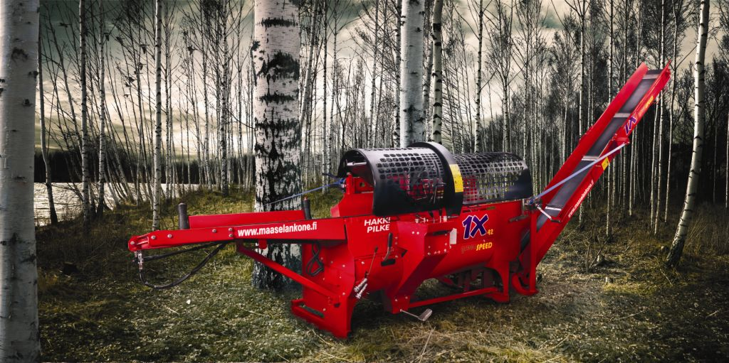 Säge-Spaltautoamt von EiFo